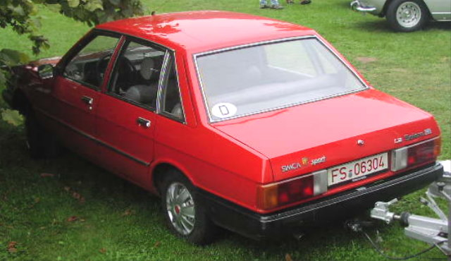 Talbot Solara